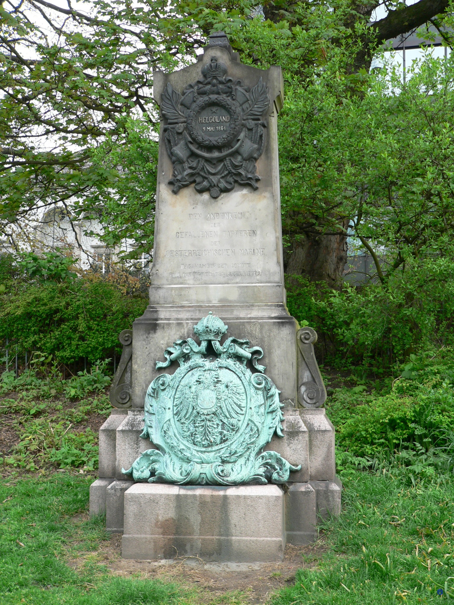 Denkmal für die Gefallenen der tapferen österreichischen Marine Helgoland-Denkmal 1864 zwischen Palmaille und Großer Elbstraße in Altona-Altstadt , Palmaille in der Grünanlage südlich von Nr. 45 This is a photograph of an architectural monument. Haller, Martin; Behrmann, W. P.; Klein und Reiher